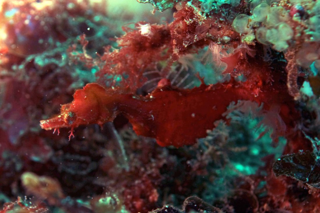 Caballito-pipa pigmeo de Sydney, Idiotropiscis lumnitzeri, en Bass Point, Shellharbour, Nueva Gales del Sur, Australia